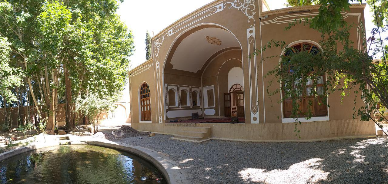 عمارت اصلی باغ خوشنویس